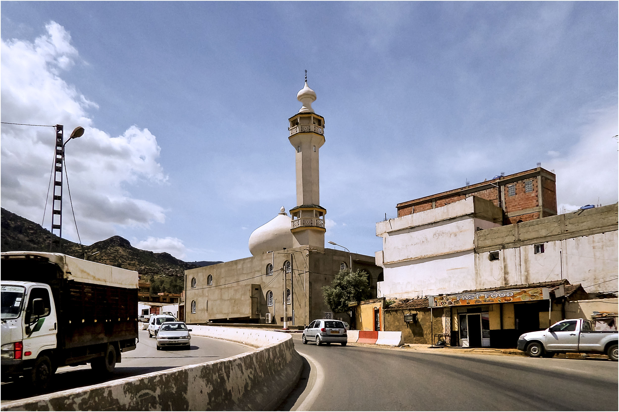 Ain Defla عين الدفلة